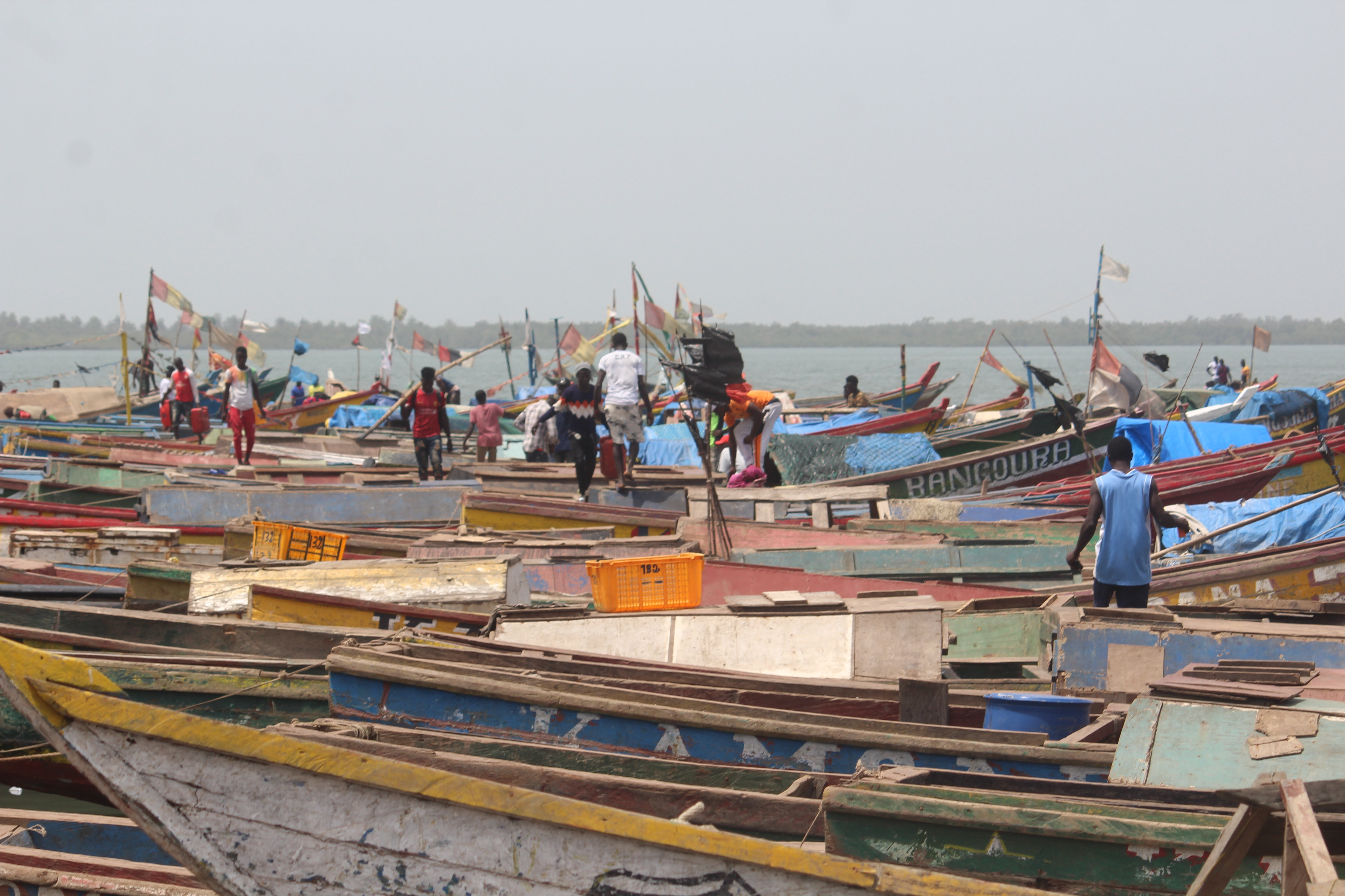 Debarcadere de port de Kamsar This is an image with the theme "Africa on the Move or Transport" from: Guinea